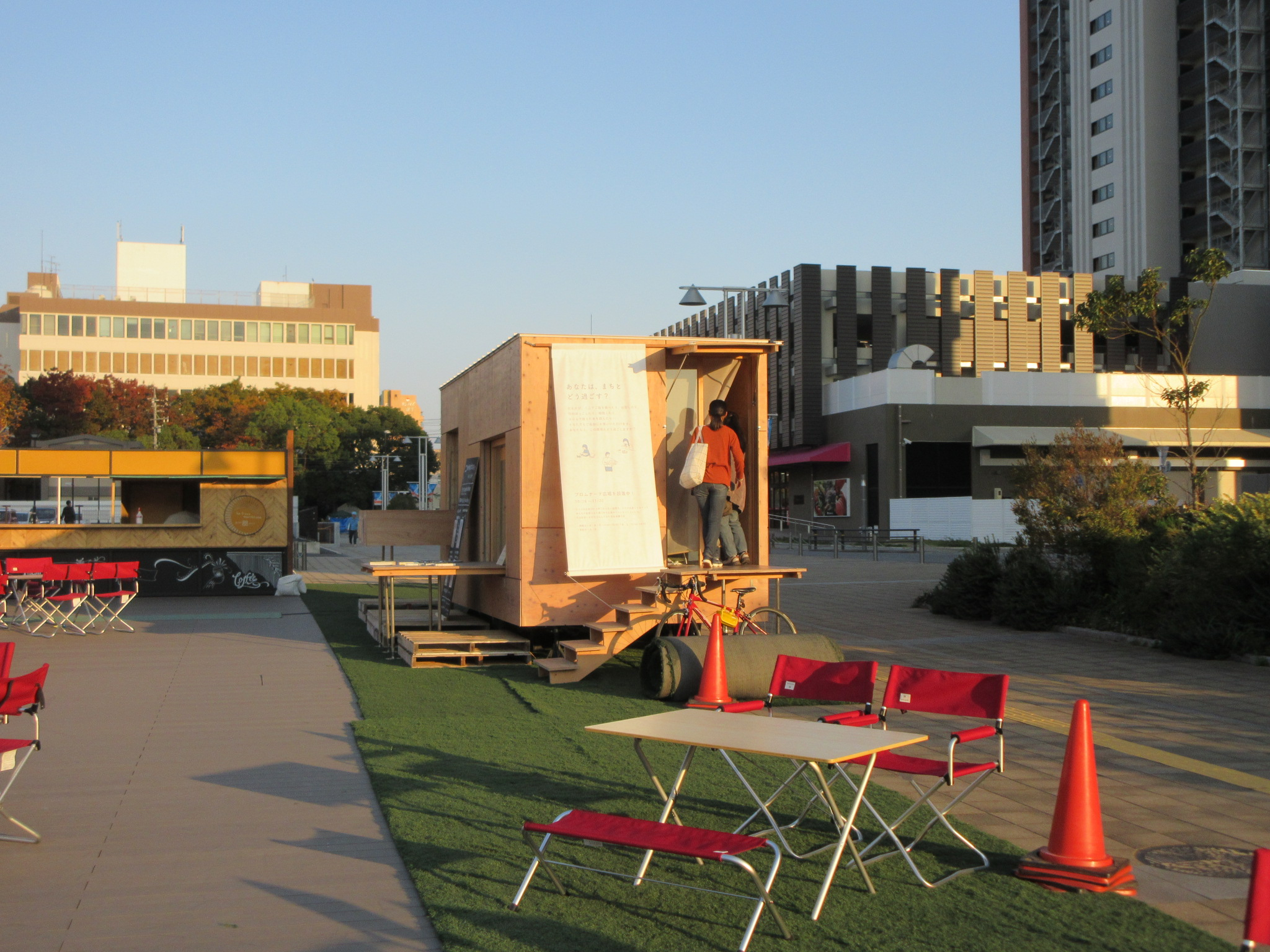 岡崎市康生通西3丁目、プロムナードにて。